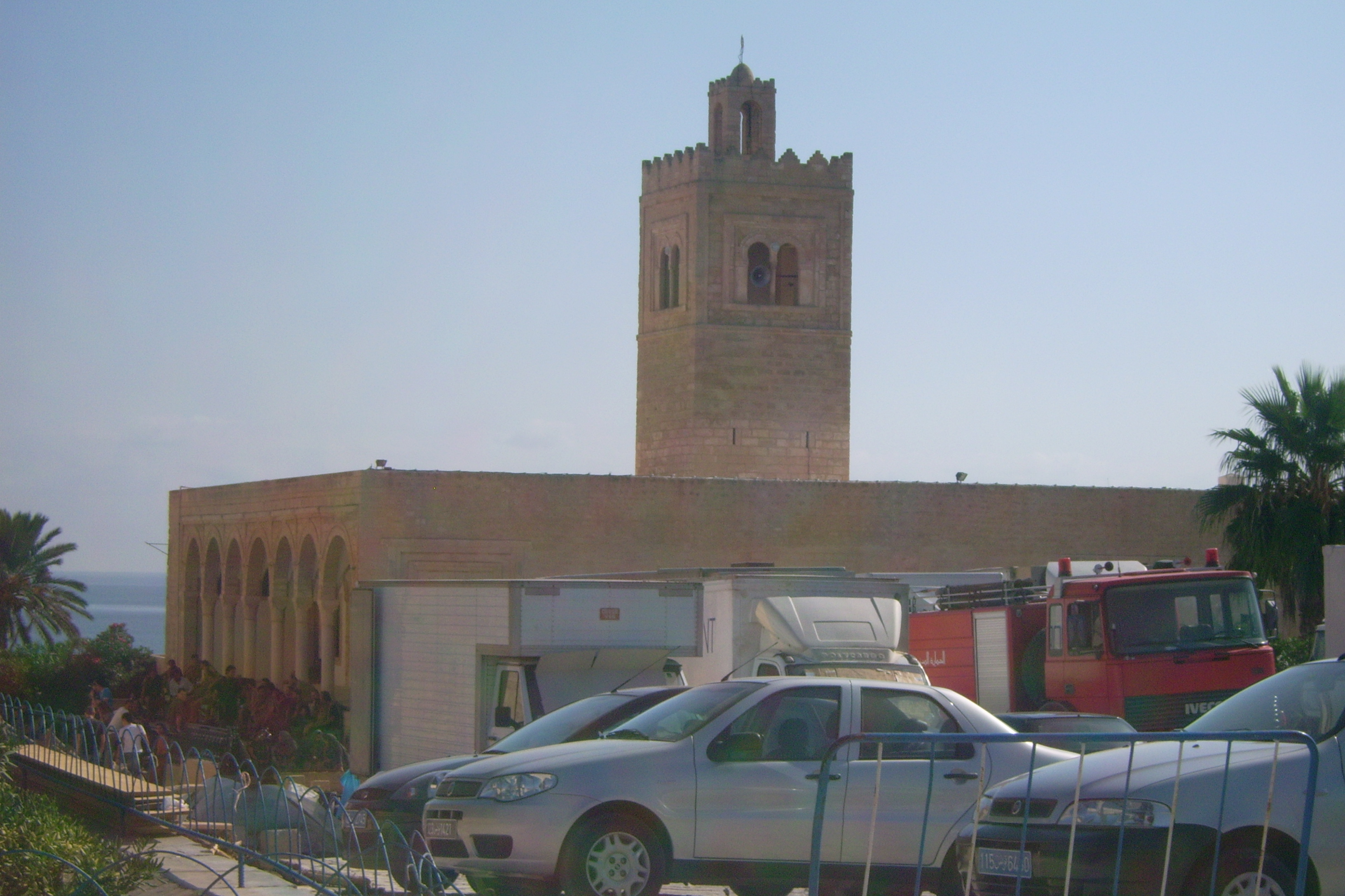 Wielki Meczet w Monastirze, Tunezja/Great Mosque, Monastir (Tunisia)